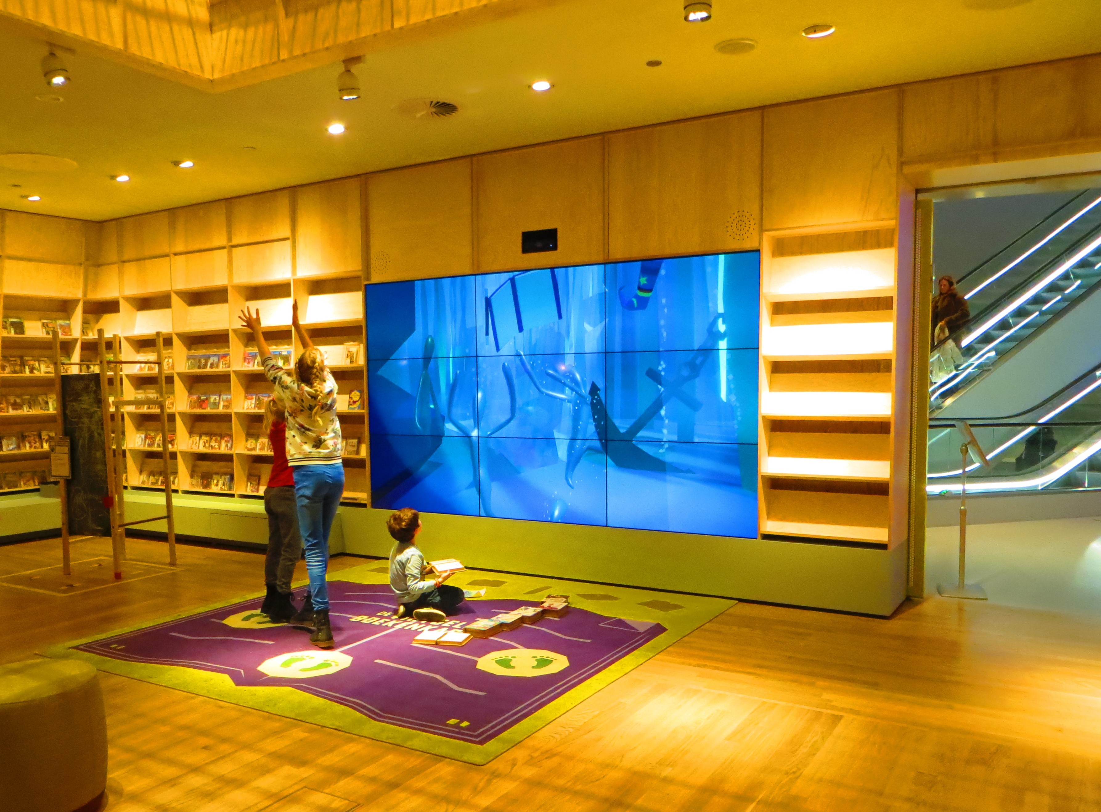 Interaktive Wand im "Wonderland", der Bibliotheksabteilung für Kinder und Jugendliche im Forum Groningen